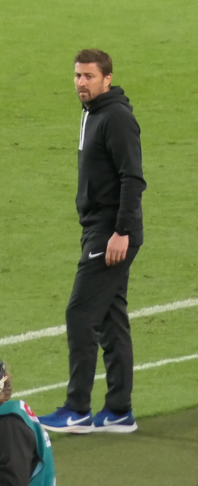 Der Fussballtrainer vom VfL Bochum, Heiko Butscher, an der Seitenlinie beim Auswärtsspiel gegen den VfB Stuttgart am 02.09.2019.